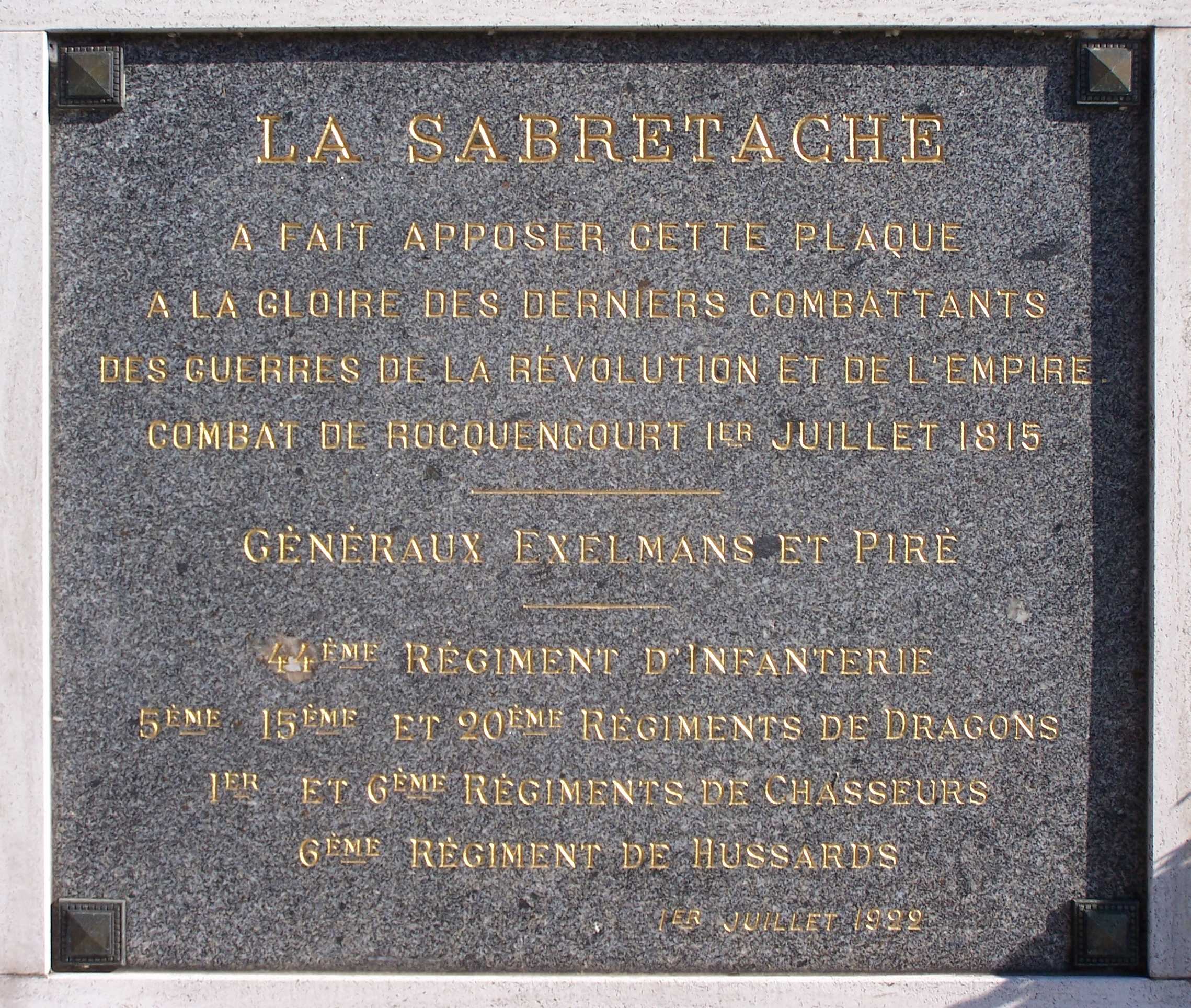 Plaque commémorative bataille de Rocquencourt (Yvelines, France)